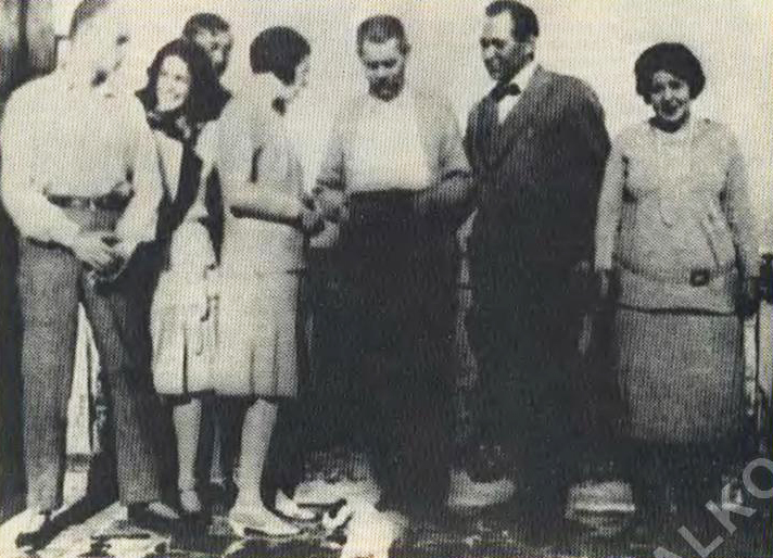 Слева направо: Максим Алексеевич Пешков, его жена Надежда Алексеевна Пешкова, художник Ракицкий, секретарь А. М. Горького Мария Игнатьевна Будберг, Алексей Максимович Горький, Василий Евдокимович Дровянников, его жена Евгения Болеславовна Дровянникова-Чернышева на вилле писателя "Иль Соррито" в Сорренто, Италия